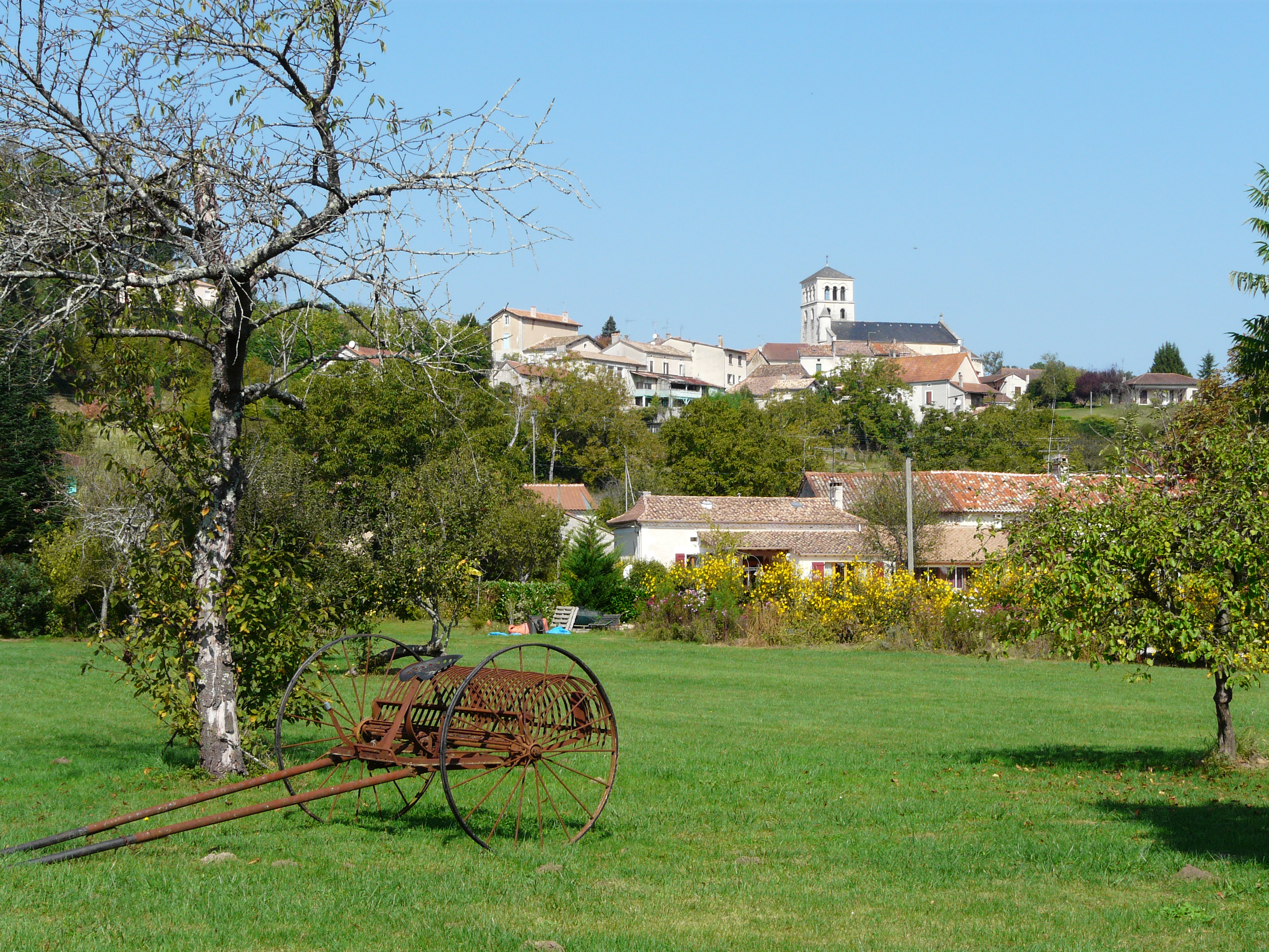 Le bourg de Douzillac, Dordogne, France